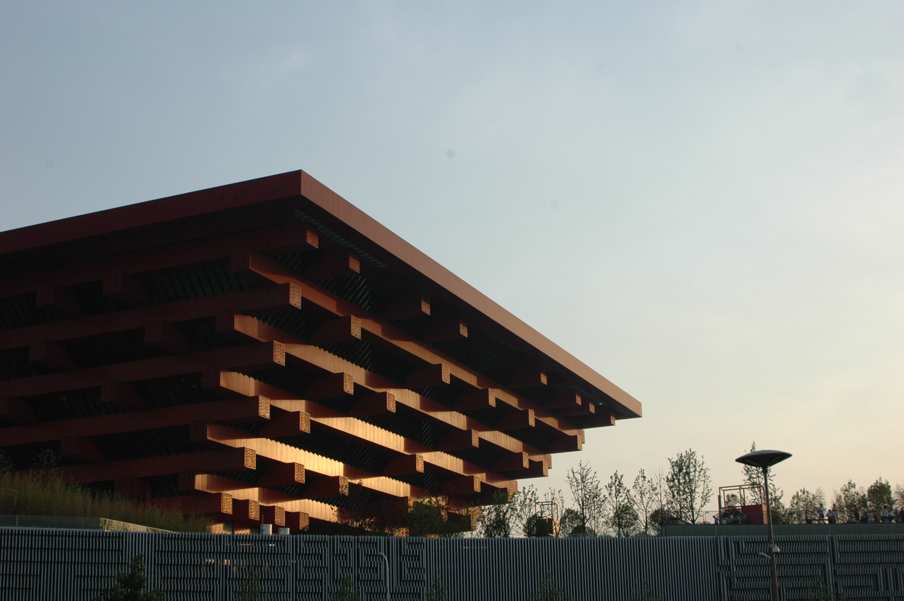 2010年上海世界博览会中国馆